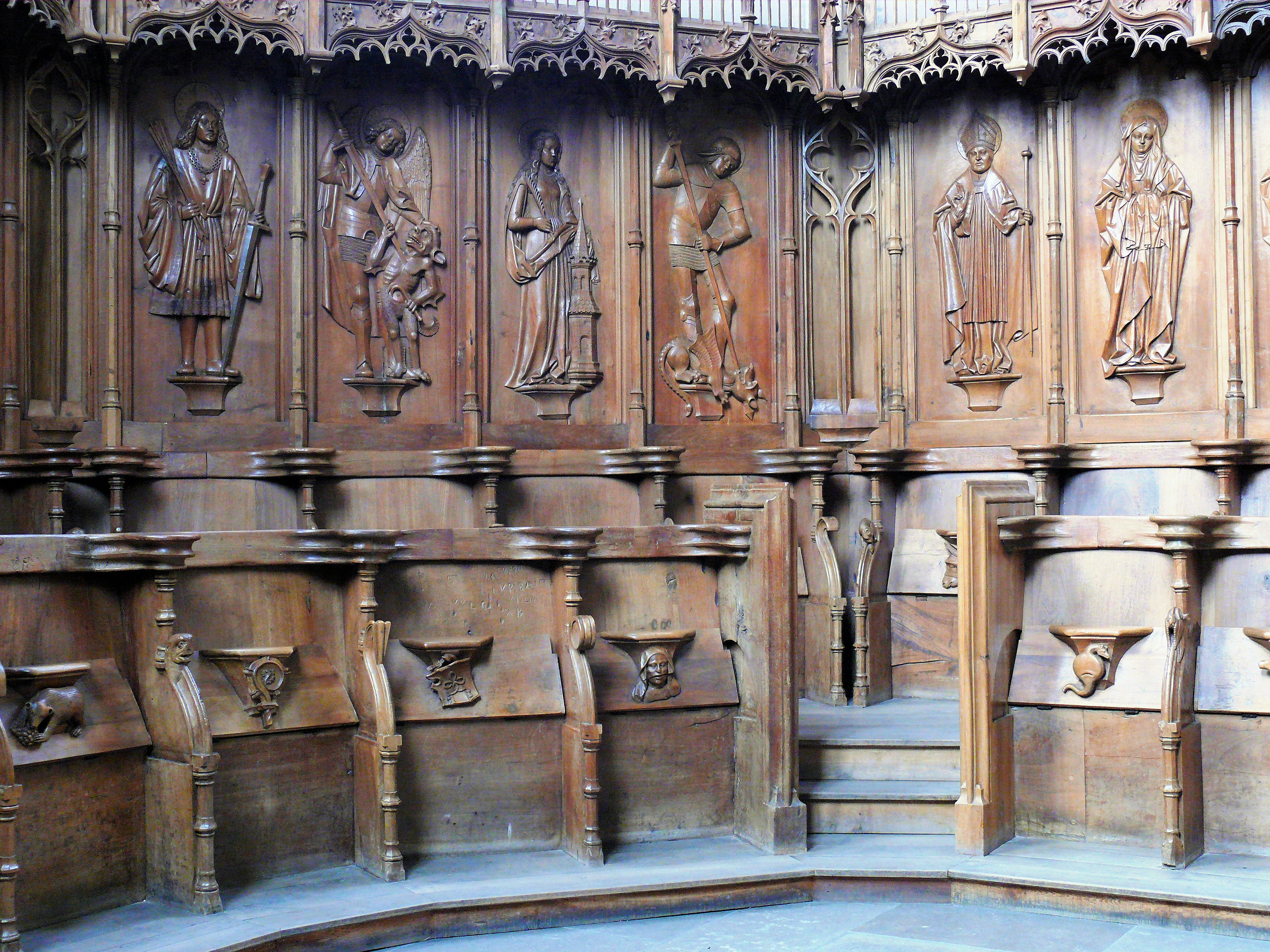 Cathédrale Saint-Jean-Baptiste de Saint-Jean-de-Maurienne - Chœur - Stalles